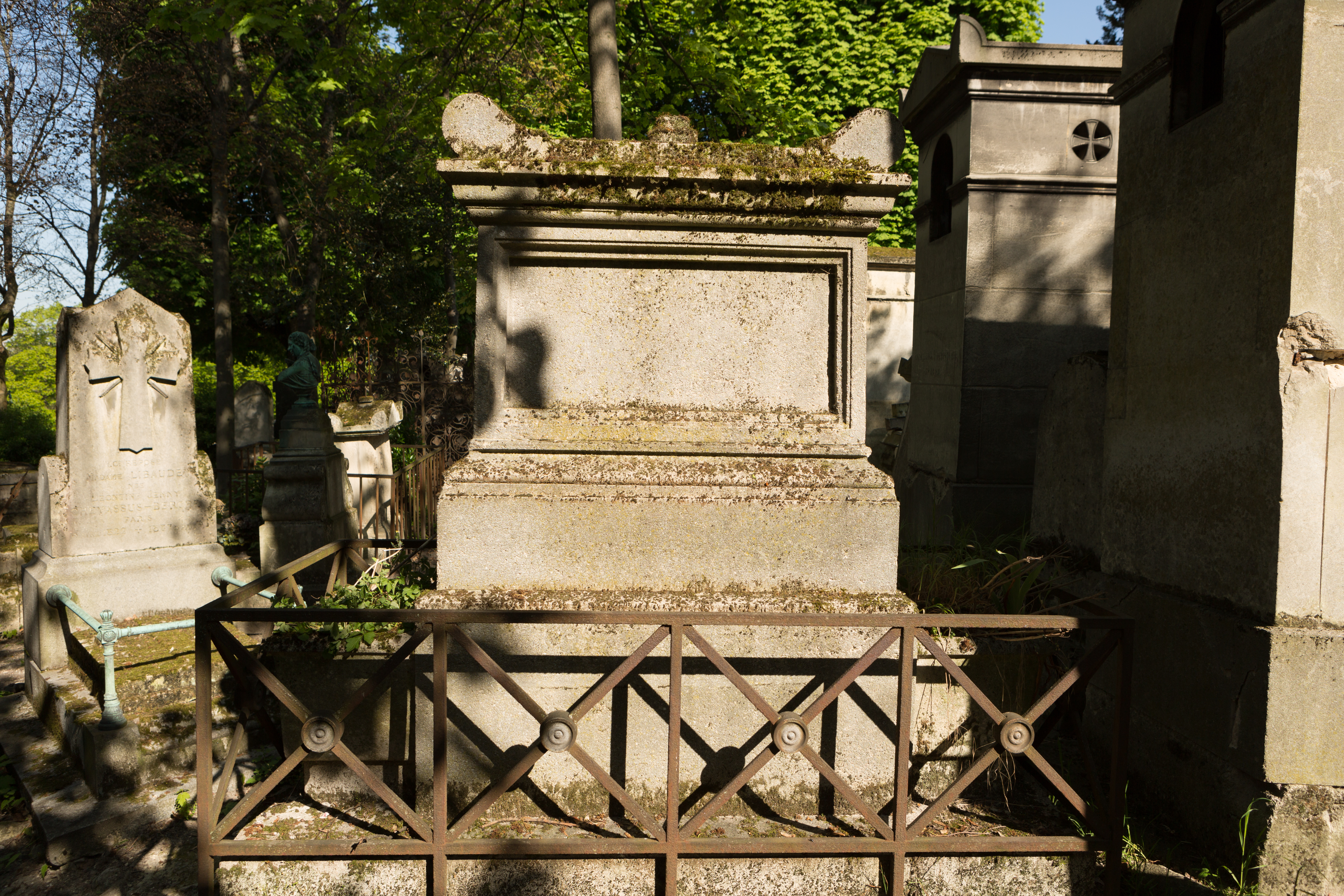 Sépulture du violoniste et compositeur Charles-Philippe Lafont (1781-1839) et du général de brigade Auguste-Marie-Constant de Conchy (1828-1898).